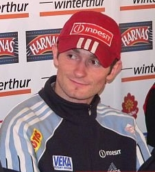 Rafał Śliż podczas konferencji przed PŚ w Zakopanem 2006 This file has been extracted from another file: Press conference - WC Ski Jumping Zakopane 2006 - Hula, Śliż.jpg